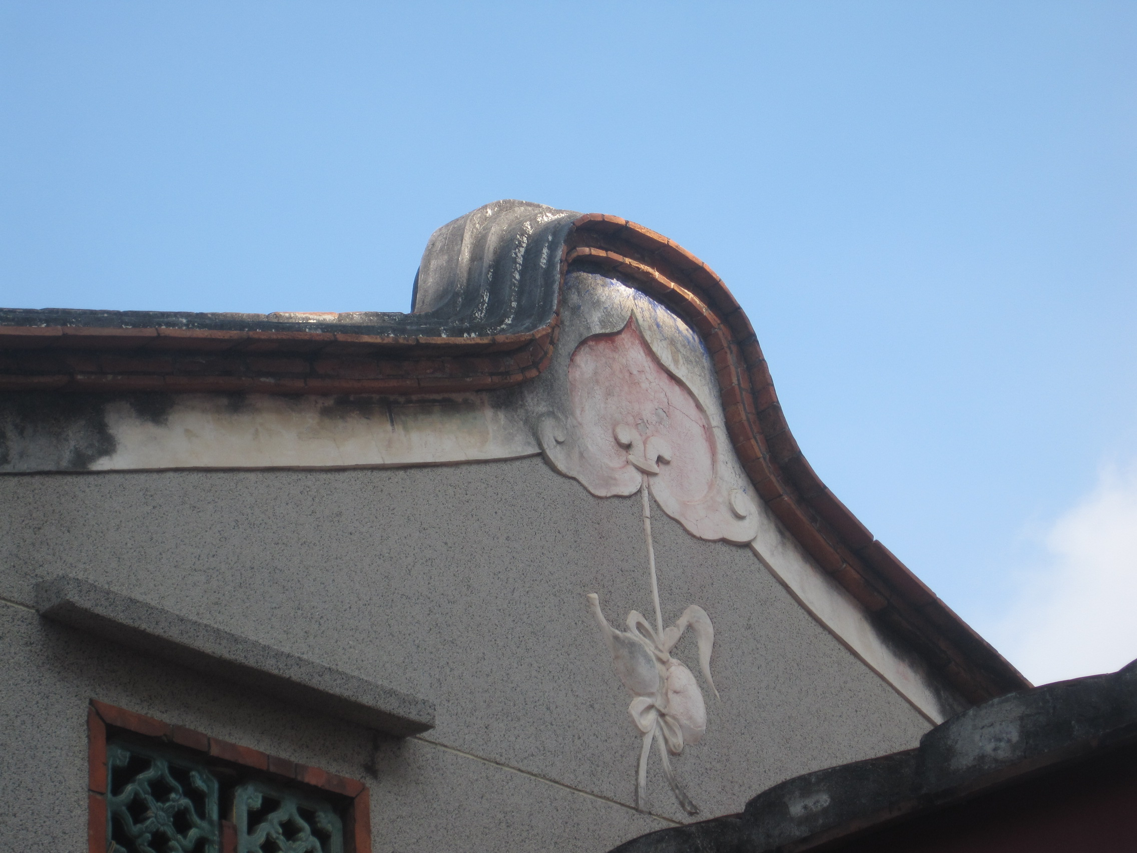 德化堂山牆，五行屬金。